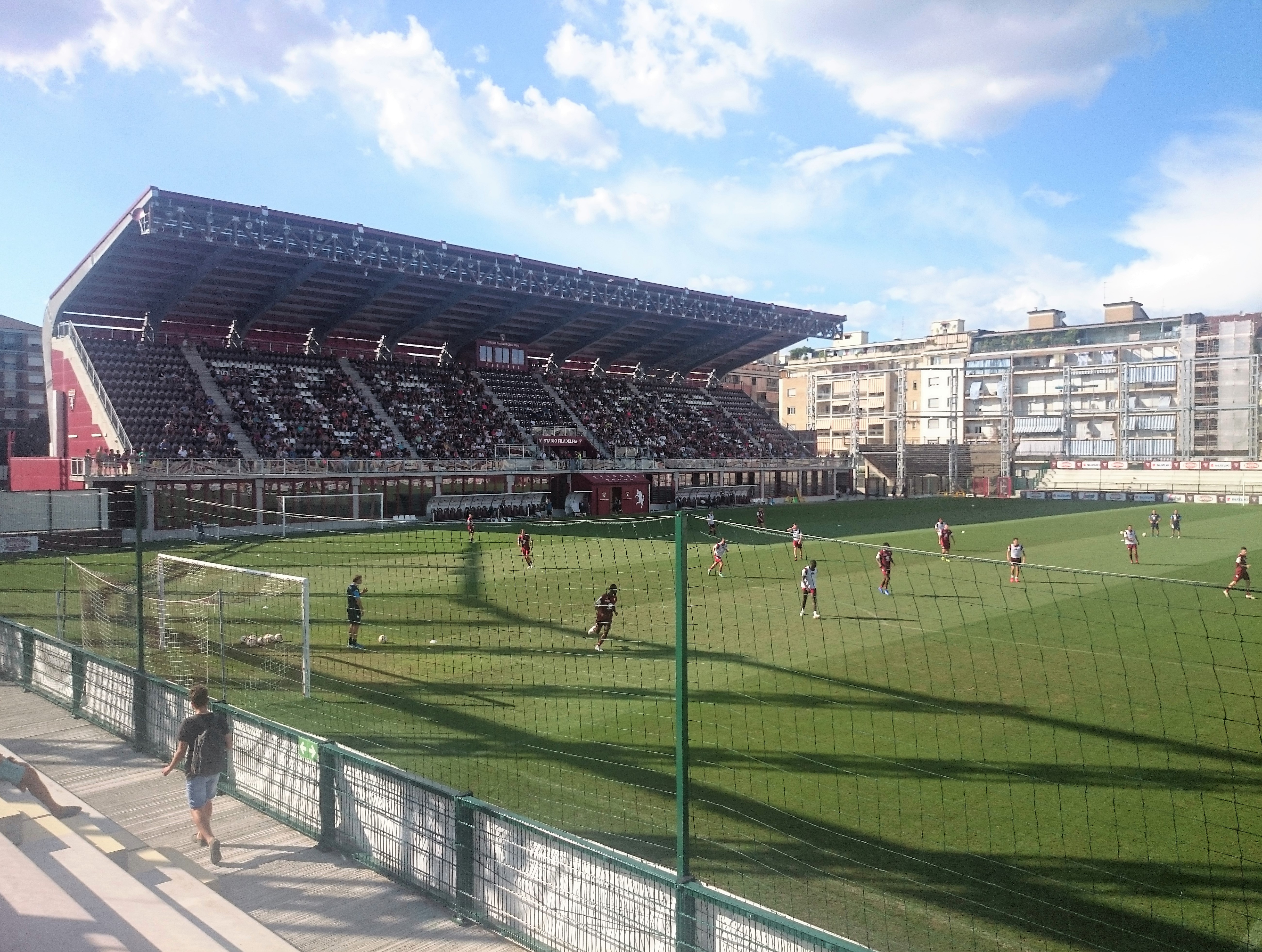 Il campo principale del Filadelfia e le tribune ricostruite simili a quelle del vecchio Stadio Filadelfia